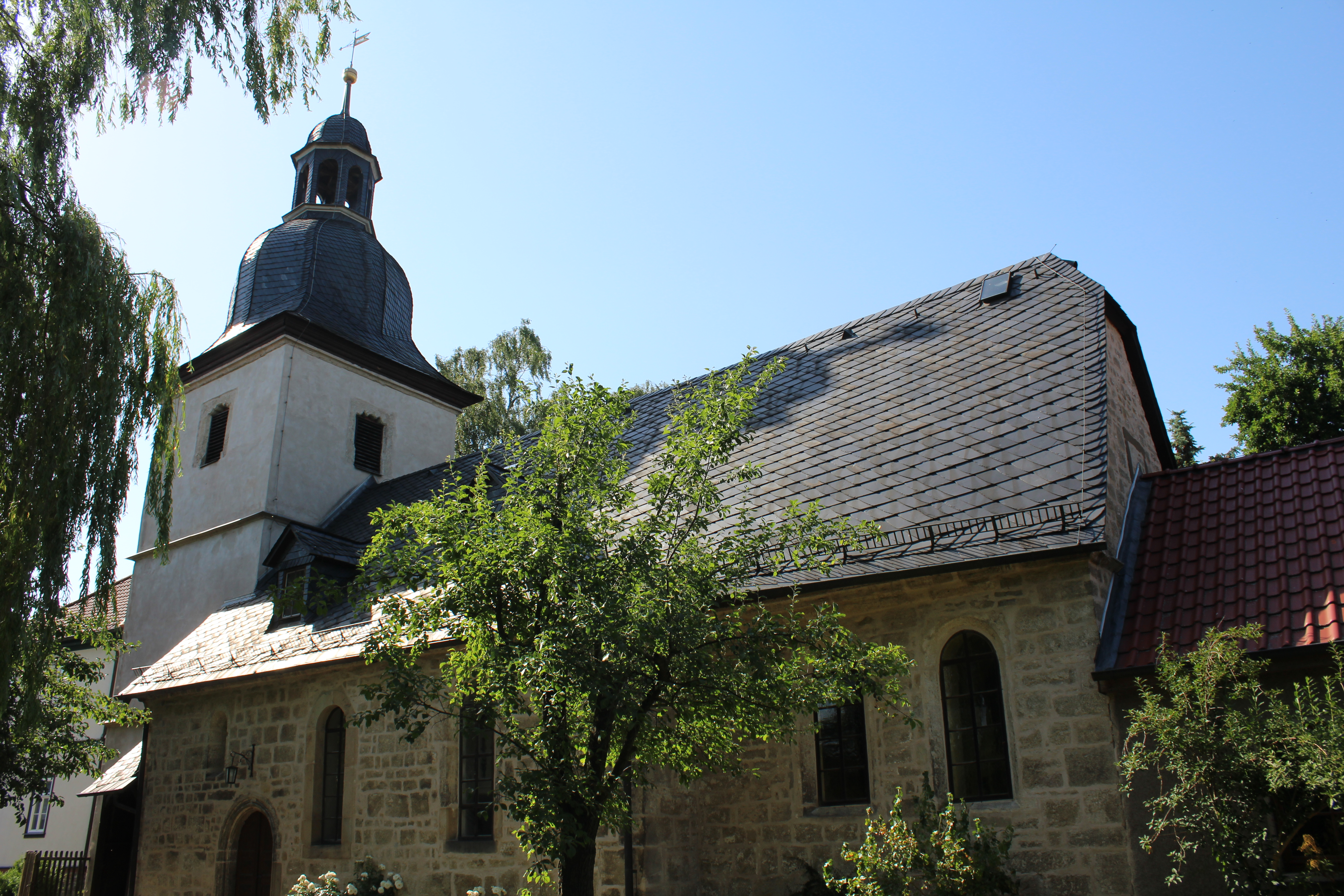 Kirche Reichenbach, Hörselberg-Hainich, Wartburgkreis, Thüringen, Deutschland